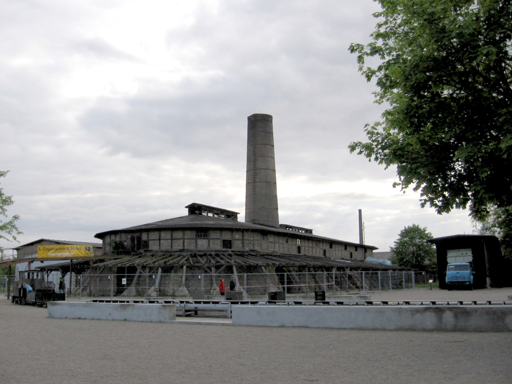 Ziegeleipark Midenberg, Ringofen